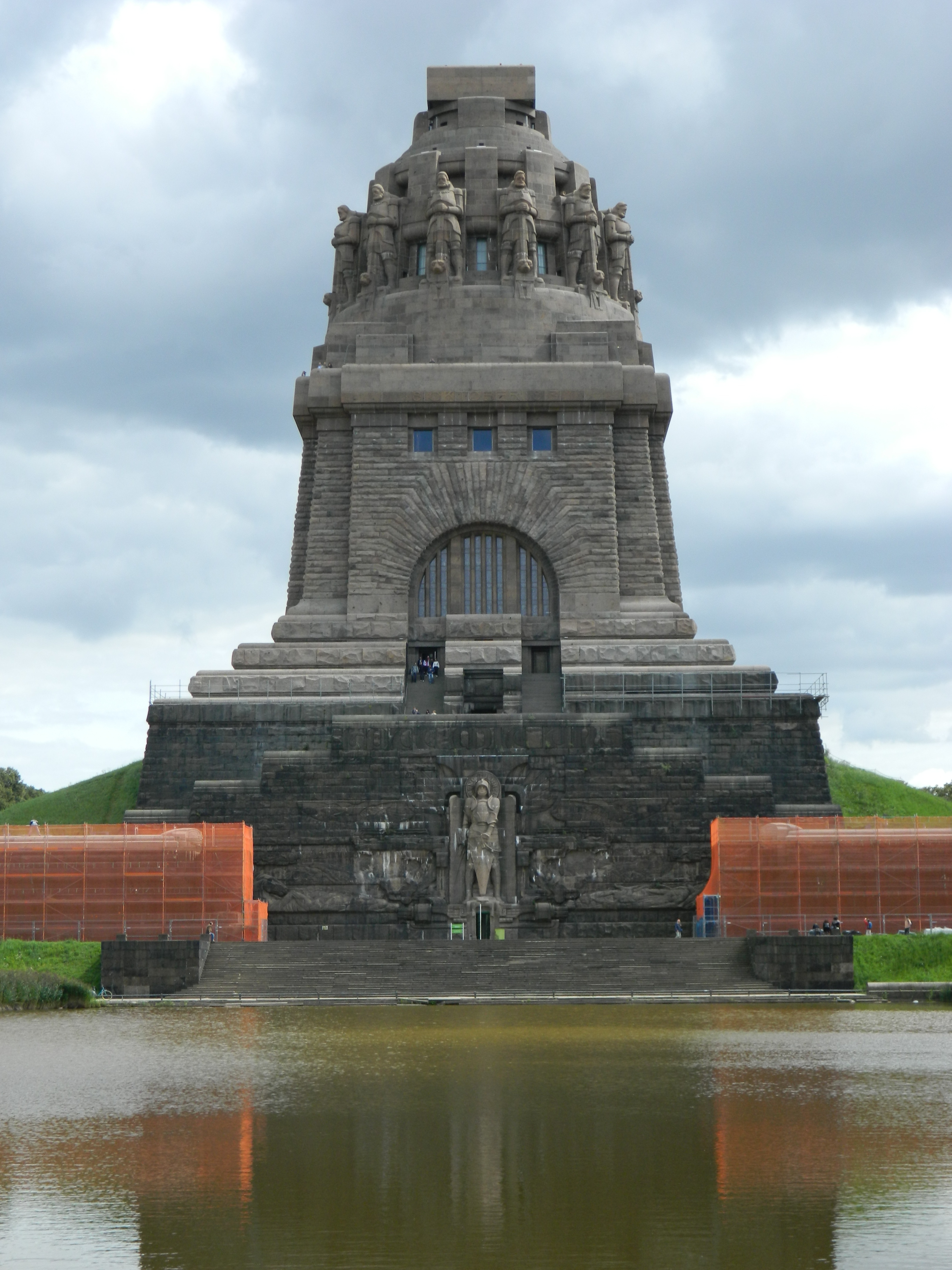 Völkerschlachtdenkmal